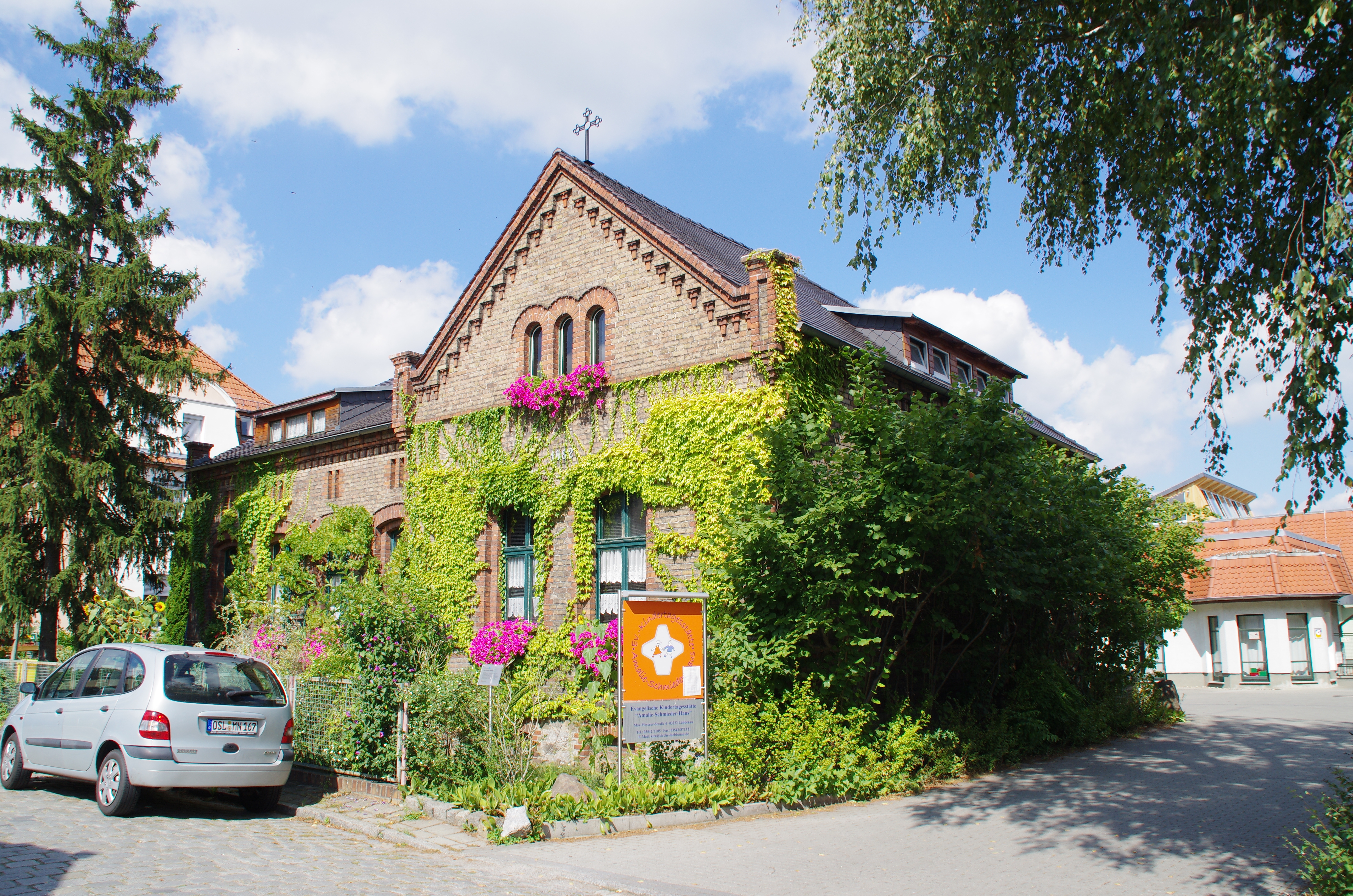 Lübbenau/Spreewald in Brandenburg. Das Haus in der Max-Plessner-Straße 4 steht unter Denkmalschutz.